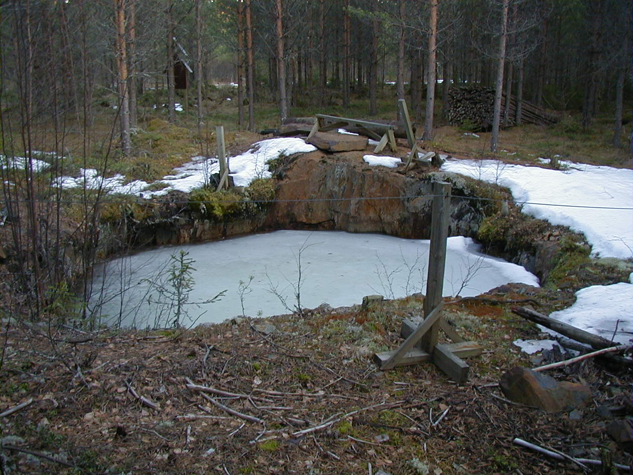 Ruukin runni. Malmilouhos